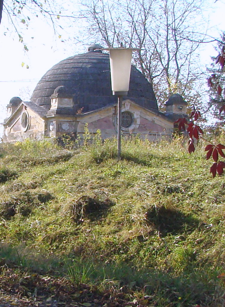 Uzina de apă și parcul, municipiul Târgu Mureș, str. Verii 4 1908 - 1909